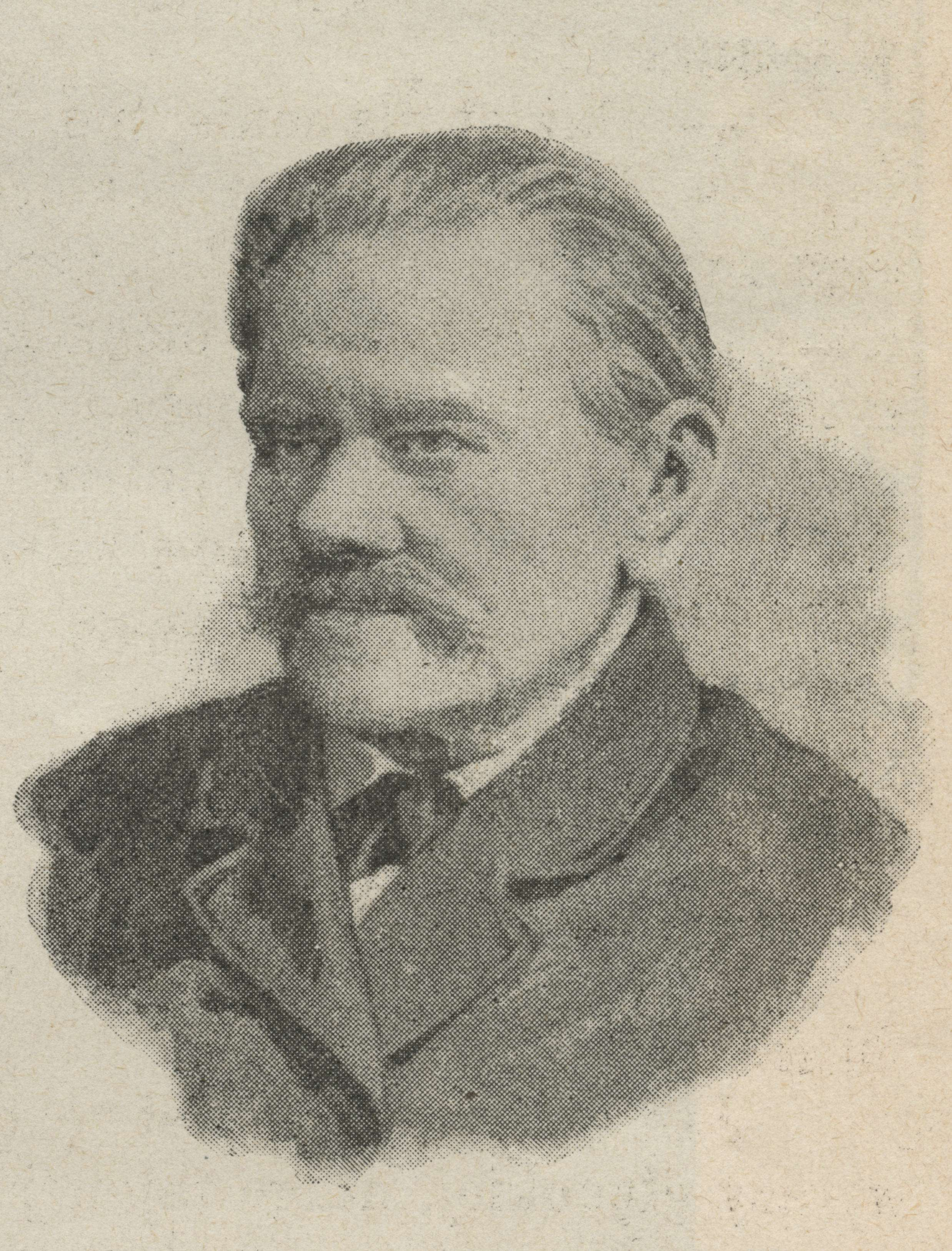 Ś. p. Jan Edward Karoli